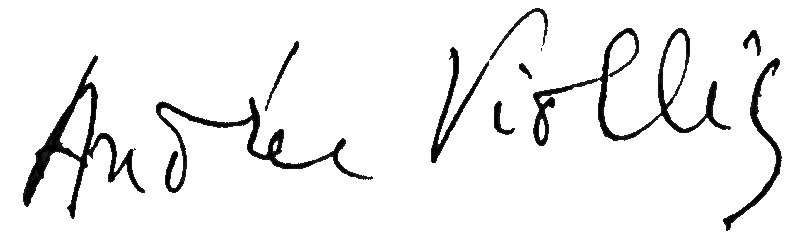 Signature d'Andrée Viollis dans son procès-verbal de réception de la légion d'honneur, conservé aux Archives nationales